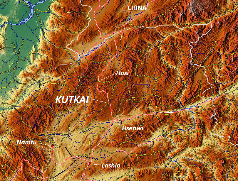 Relief map of Kutkai